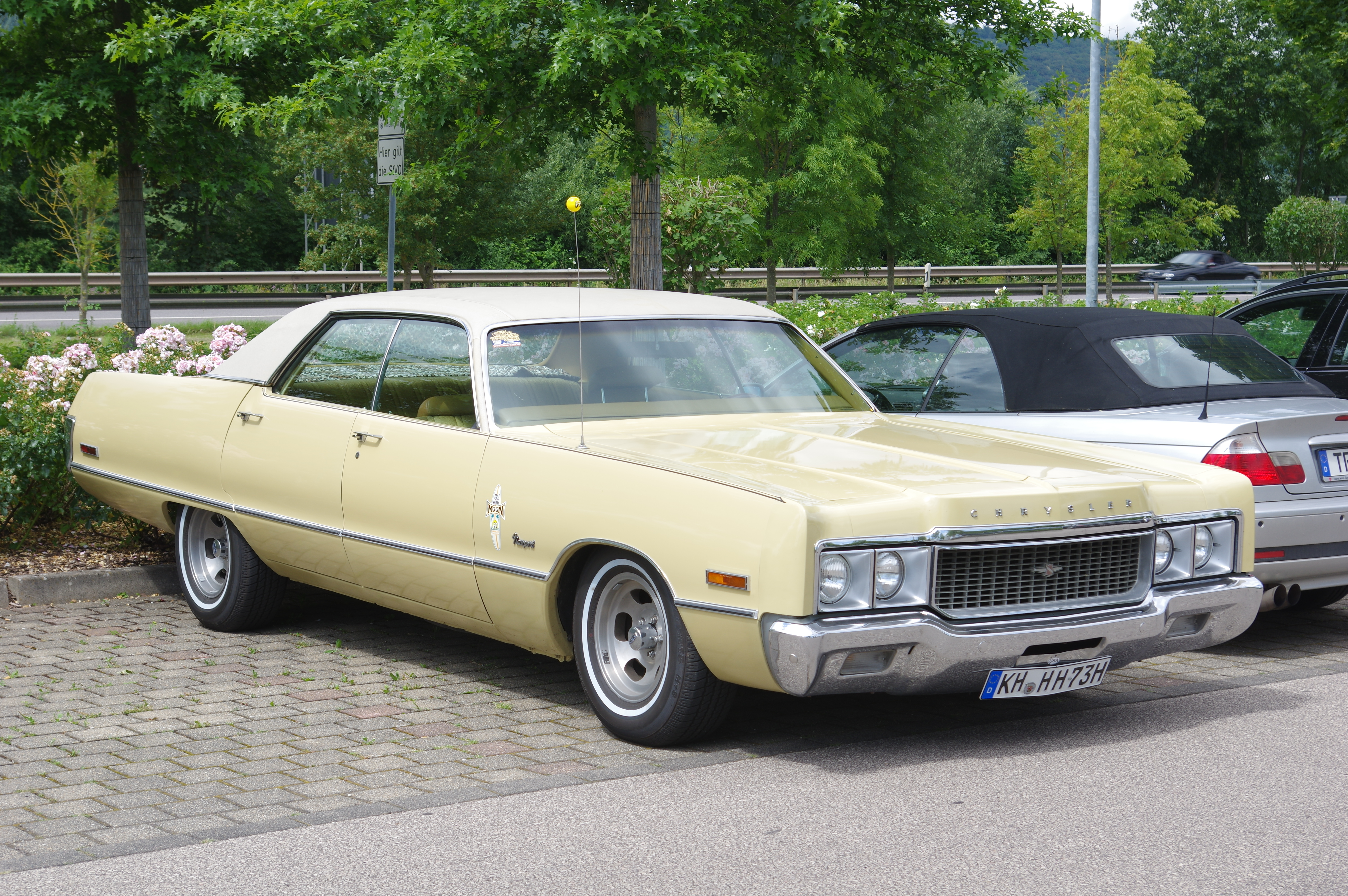 Chrysler Newport 1973 , 32. Internationales Oldtimer Treffen Konz 2016, Das Nummernschild ist verfälscht!